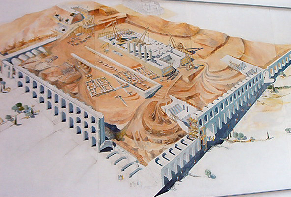 Restitution du terrassement de Byrsa romaine, Musée national de Carthage